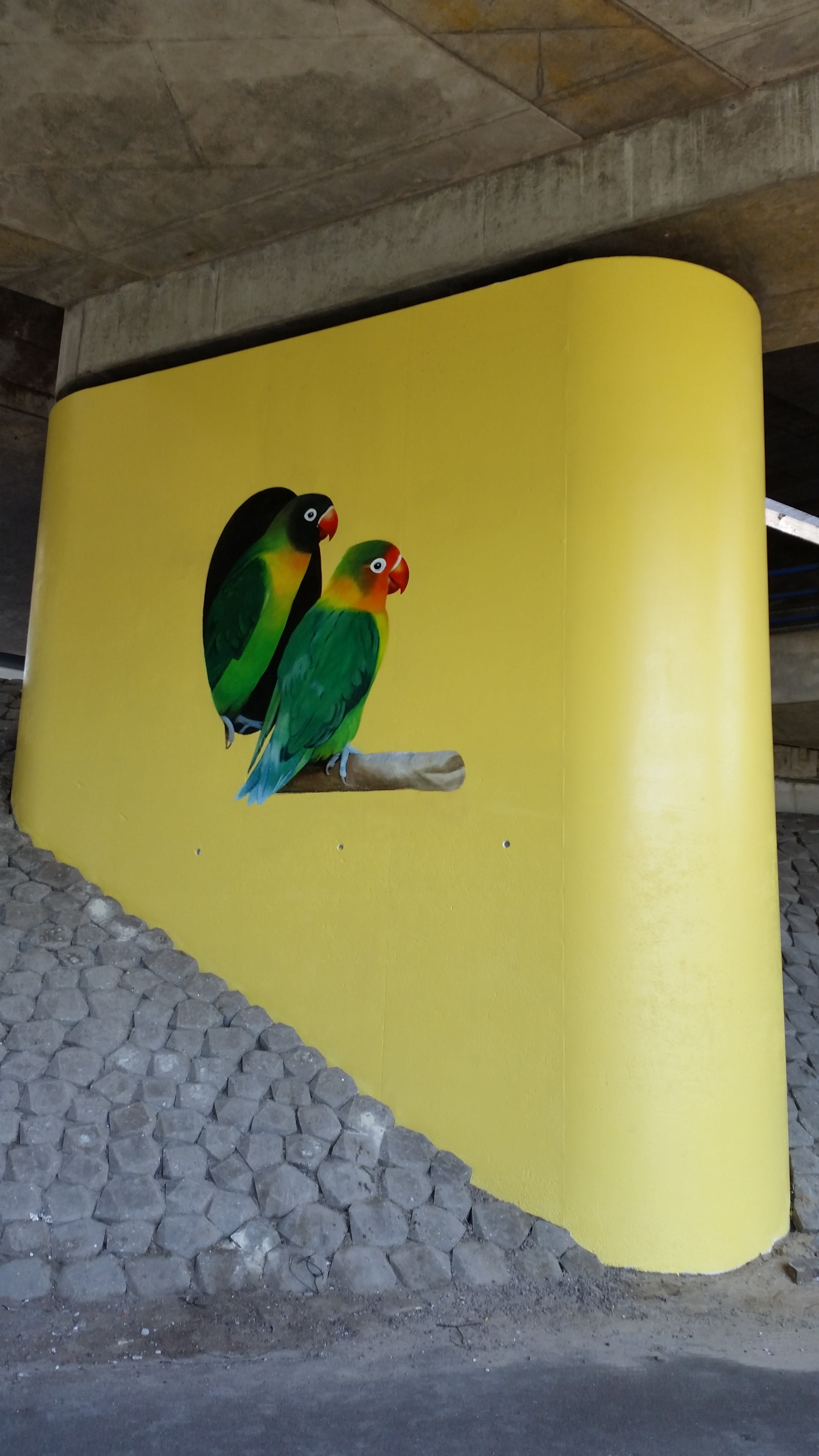 Beschilderde pijlers van de Betondorpbrug (mei 2020)